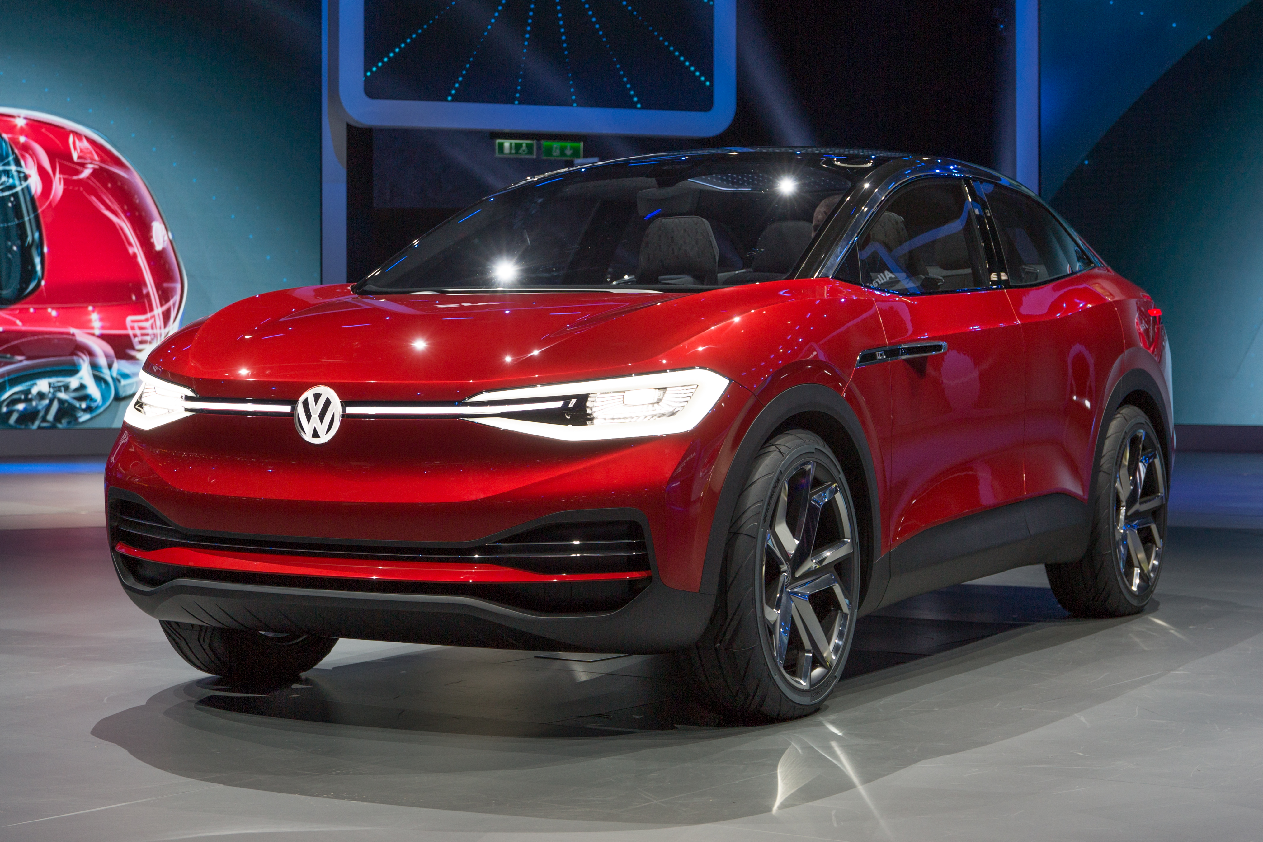 VW I.D. Crozz